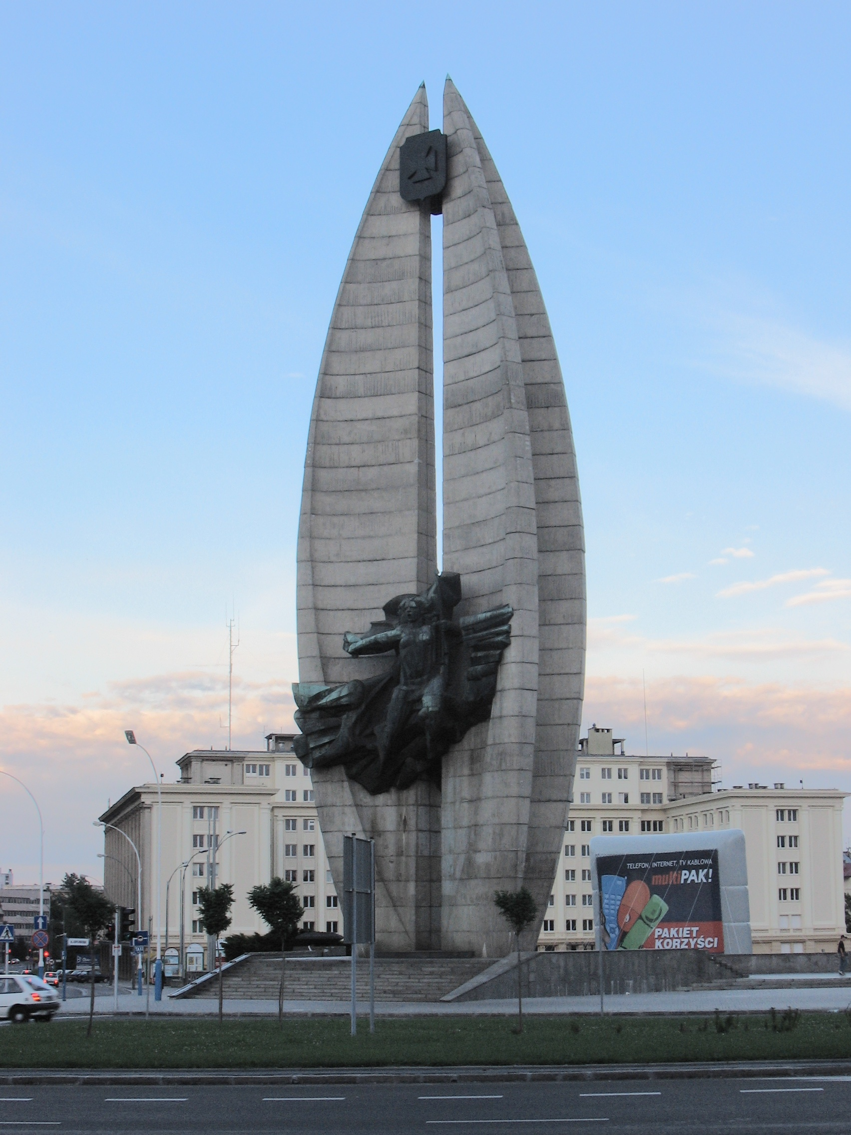 Rzeszowski Pomnik Czynu Rewolucyjnego umieszczony w centrum miasta. Autor: user:Ajgon